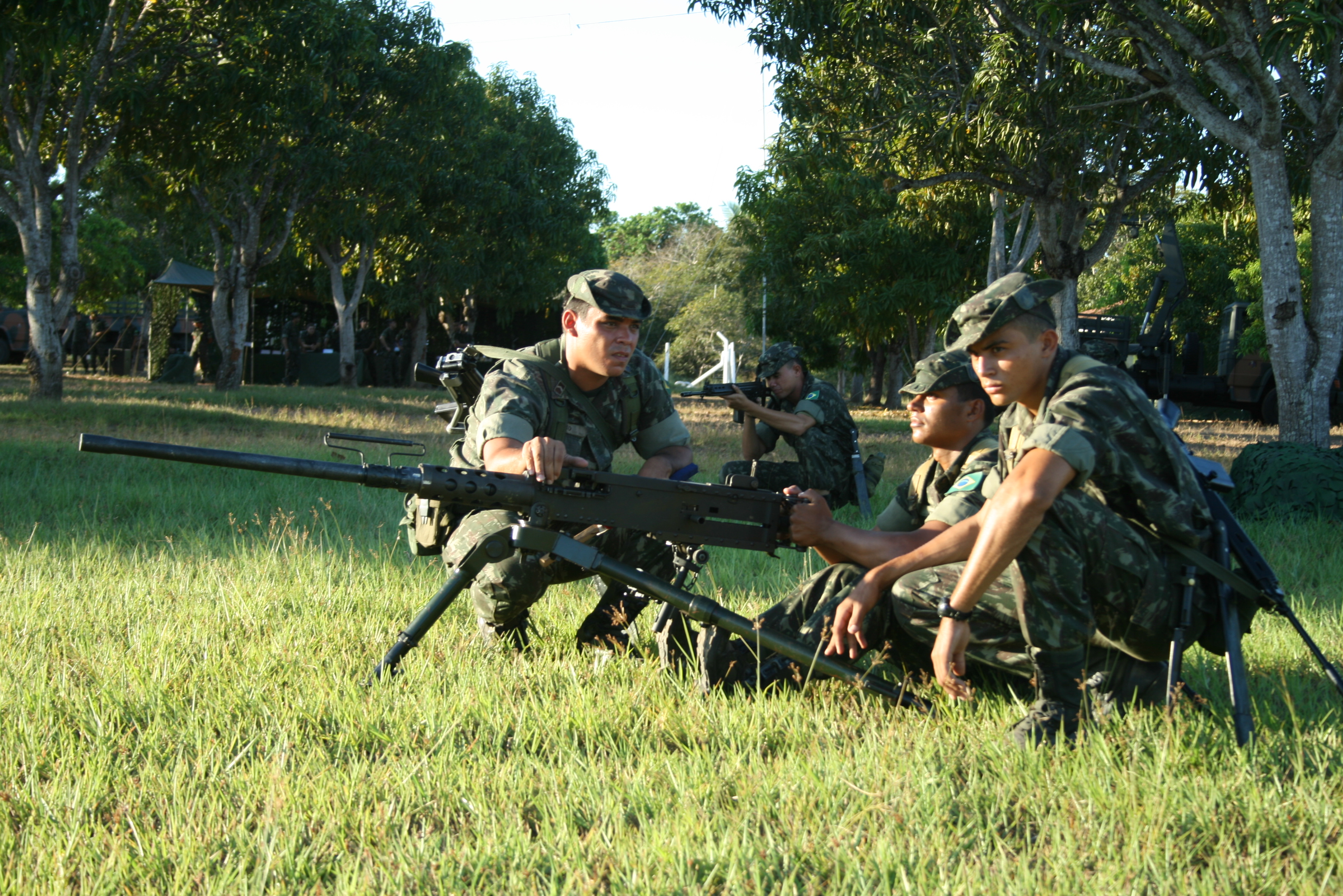 Simulação de uma ação militar no 52º Batalhão de Infantaria de Exército.